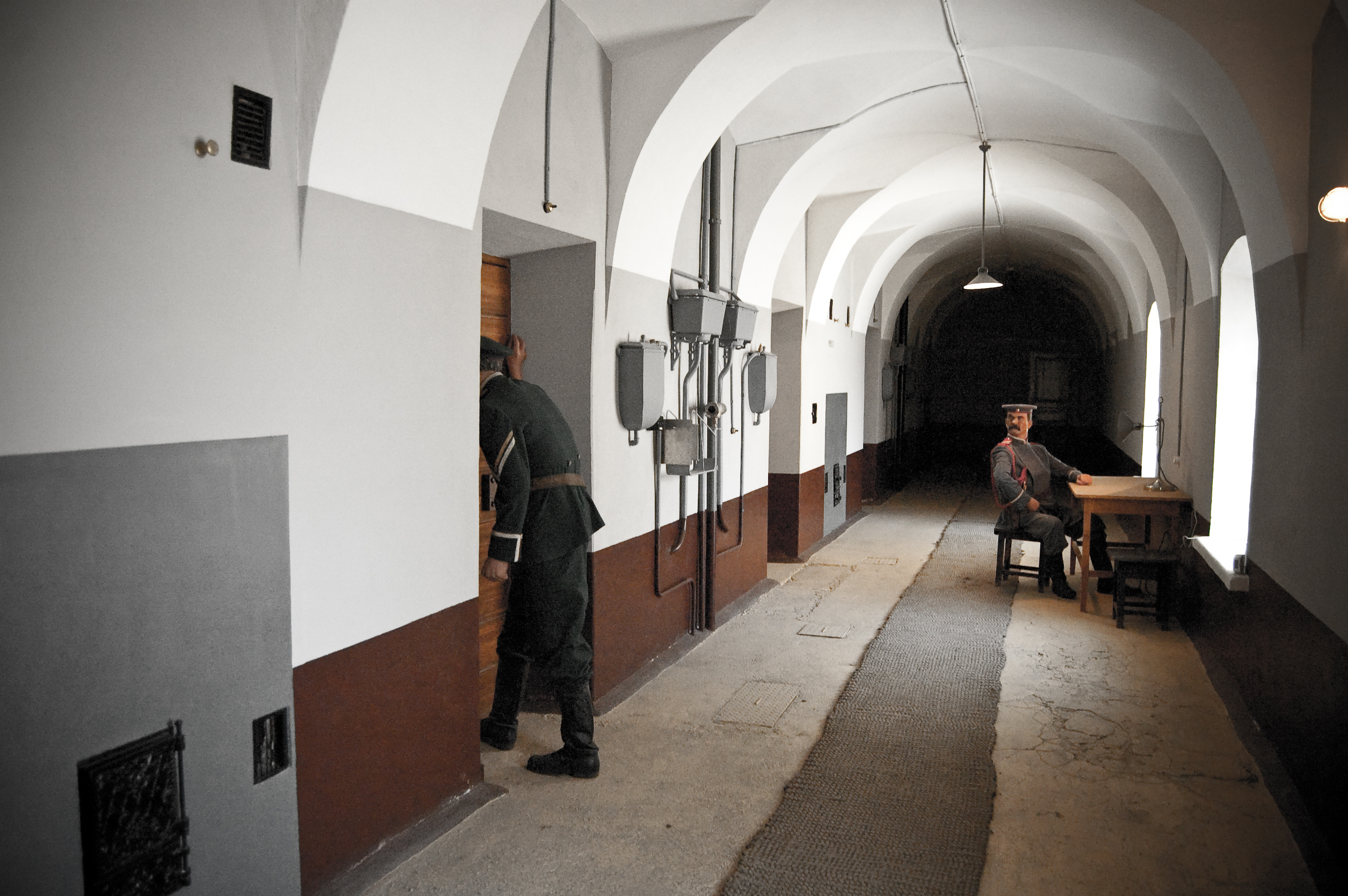 надзиратели